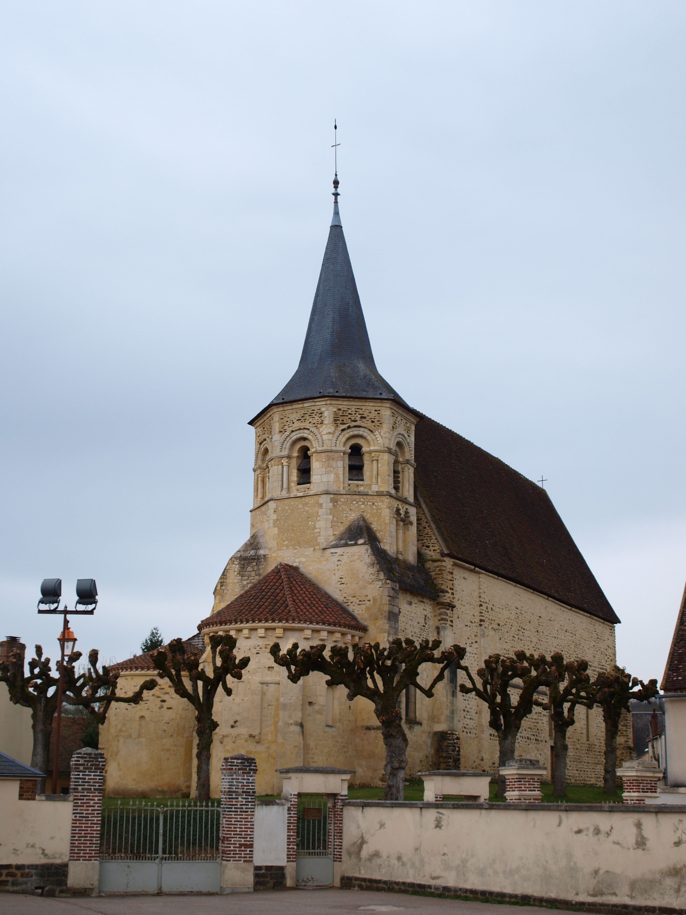 Parly (Yonne, France) , dans le village : église